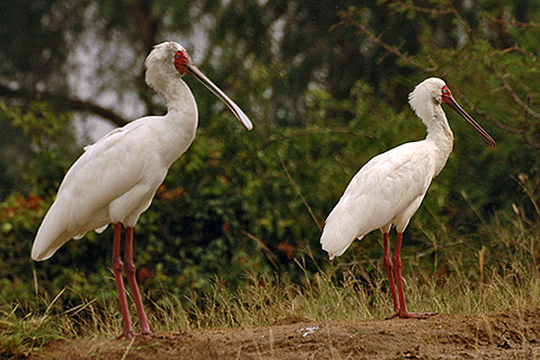 Uganda African Spoonbill (Platalea alba) Kazinga Channel, W. Uganda